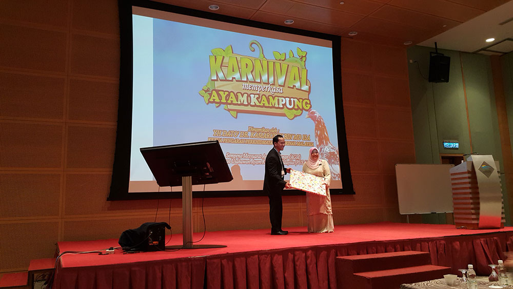 Perasmian Karnival Ayam Kampung